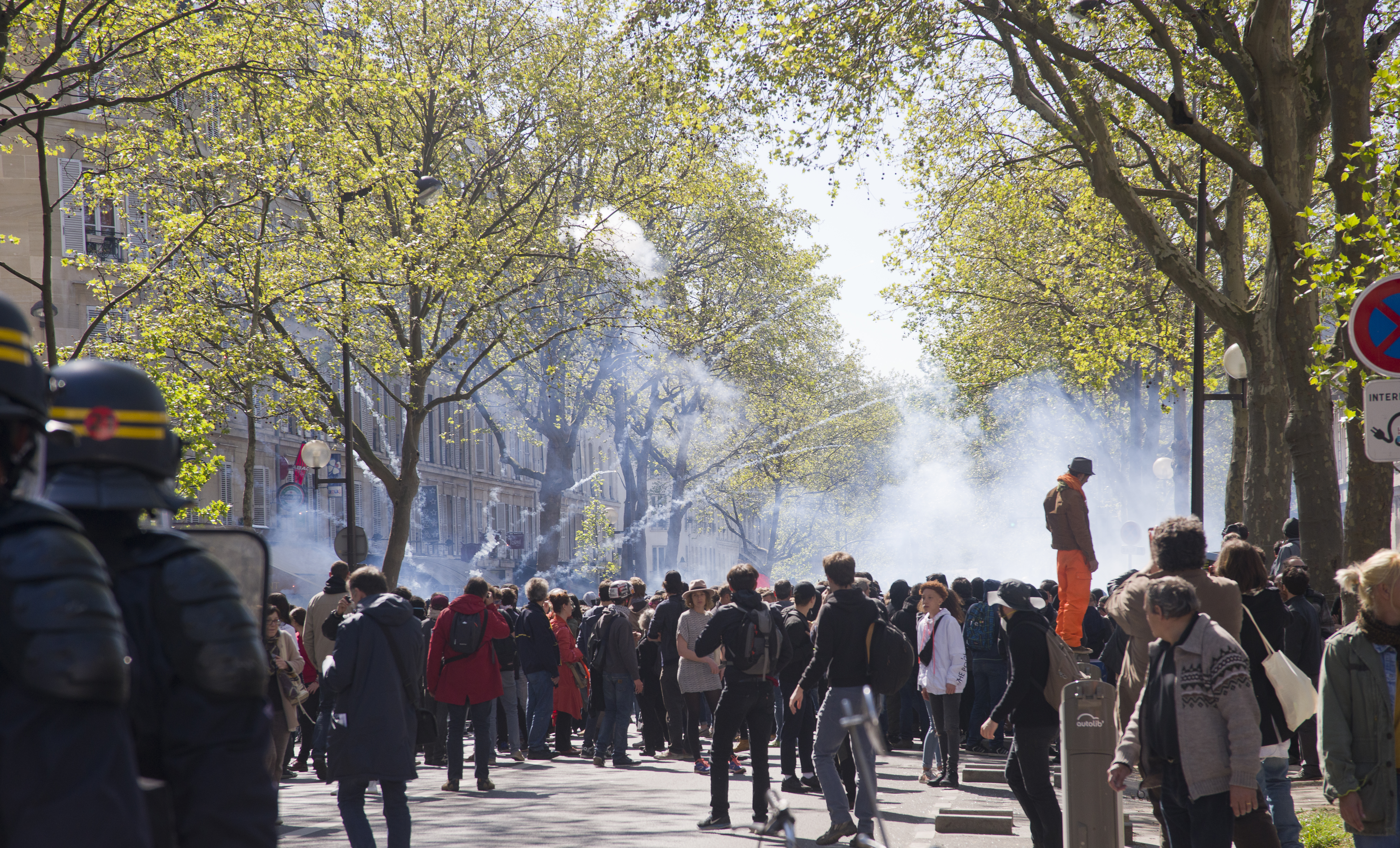 Rassemblement "Nuit Debout" à Paris le 62 mars.